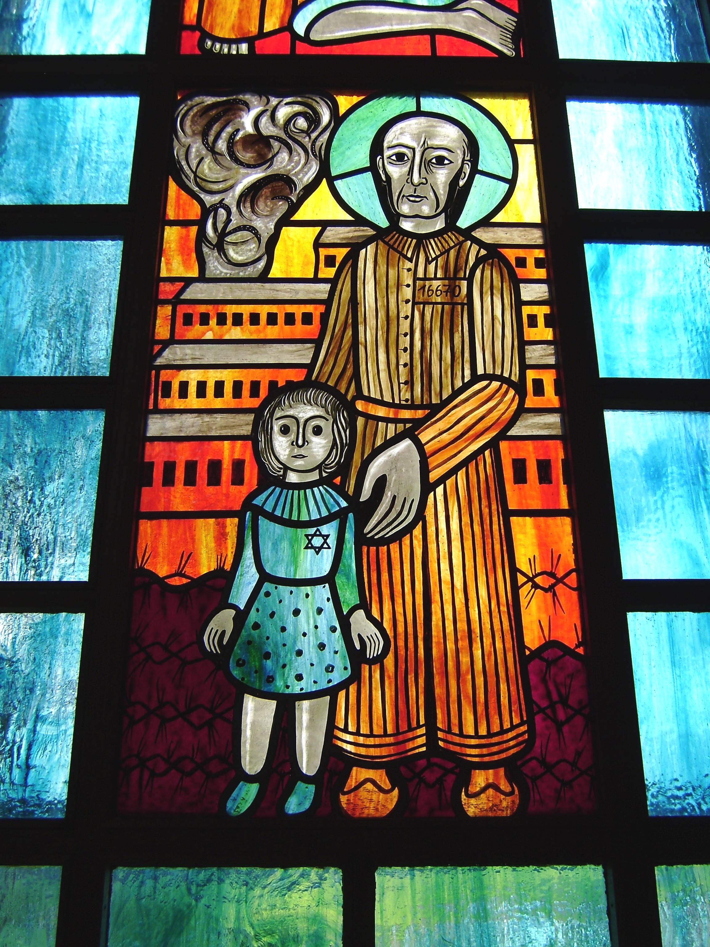 Pestkapelle bei Stiefenhofen, Westallgäu, Bayern, Germany, Glasbild rechts unten, Gewalttat und Sterben. Auszug aus dem Informationsblatt vor Ort: Die Baracken und die rauchenden Krematoiumsschornsteine des Konzentrationslagers stehen als Symbole für alles, was Menschen anderen Menschen antun können. Das Mädchen mit dem Davidsstern erinnert an die Ermordung der 5-Jährigen Gabi Schwarz-Eckert im Frühjahr 1943 im KZ Auschwitz. Dass es inmitten aller Unmenschlichkeit doch christliche Nächstenliebe gibt, die sogar das eigene Leben opfert, verkörpert dahinter mit der Häftlingsnummer 16670 Pater Maximilian Kolbe, der bereits 1941 im gleichen KZ umgebracht wurde.